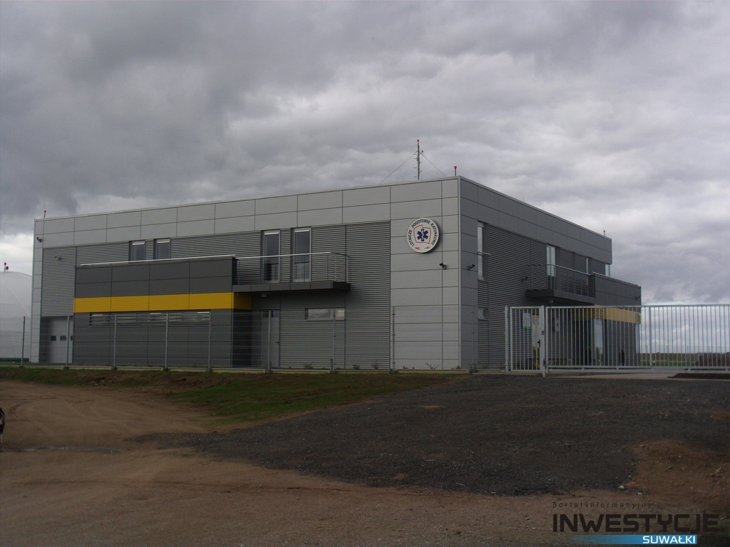 Niniejszym zaświadczam, że ja Adrian Piekarski, jestem prawnym reprezentantem właścicieli wyłącznych majątkowych praw autorskich do plików pierwotnie dostępnych pod adresem Pliki zamieszczono w projektach Wikimedia, jako Baza Lotniczego Pogotowia Ratunkowego w Suwałkach by Adrian Piekarski 2012 (01).JPG. Wyrażam zgodę na wykorzystanie wspomnianych utworów na zasadach licencji Creative Commons: uznanie autorstwa, na tych samych warunkach, wersja 3.0 ( Jestem świadomy, że udostępniając tę pracę na wyżej wspomnianych licencjach zgadzam się na jej komercyjne wykorzystanie i modyfikacje w zależności od potrzeb użytkowników. Wiem, że autorzy zachowują osobiste prawa autorskie do wspomnianej pracy i że, o ile wyrażają taką wolę, ich autorstwo musi być uznane na zasadach wybranej powyżej licencji. Modyfikacje wprowadzone do pracy nie będą natomiast przypisywane tym autorom. Jestem świadomy, że licencja odnosi się tylko do kwestii prawno-autorskich, zastrzegam sobie prawo do podjęcia działań w stosunku do osób wykorzystujących w/w utwór w sposób sugerujący paszkwil czy zniesławienie oraz w przypadkach naruszania przez takie osoby praw osobistych, praw pokrewnych czy ograniczeń związanych ze znakami towarowymi. Przyjmuję do wiadomości, że wyrażonej niniejszym zgody nie mogę cofnąć i że pliki na wykorzystanie, których wyraziłem zgodę mogą być bezterminowo przechowywane w projektach Wikimedia.